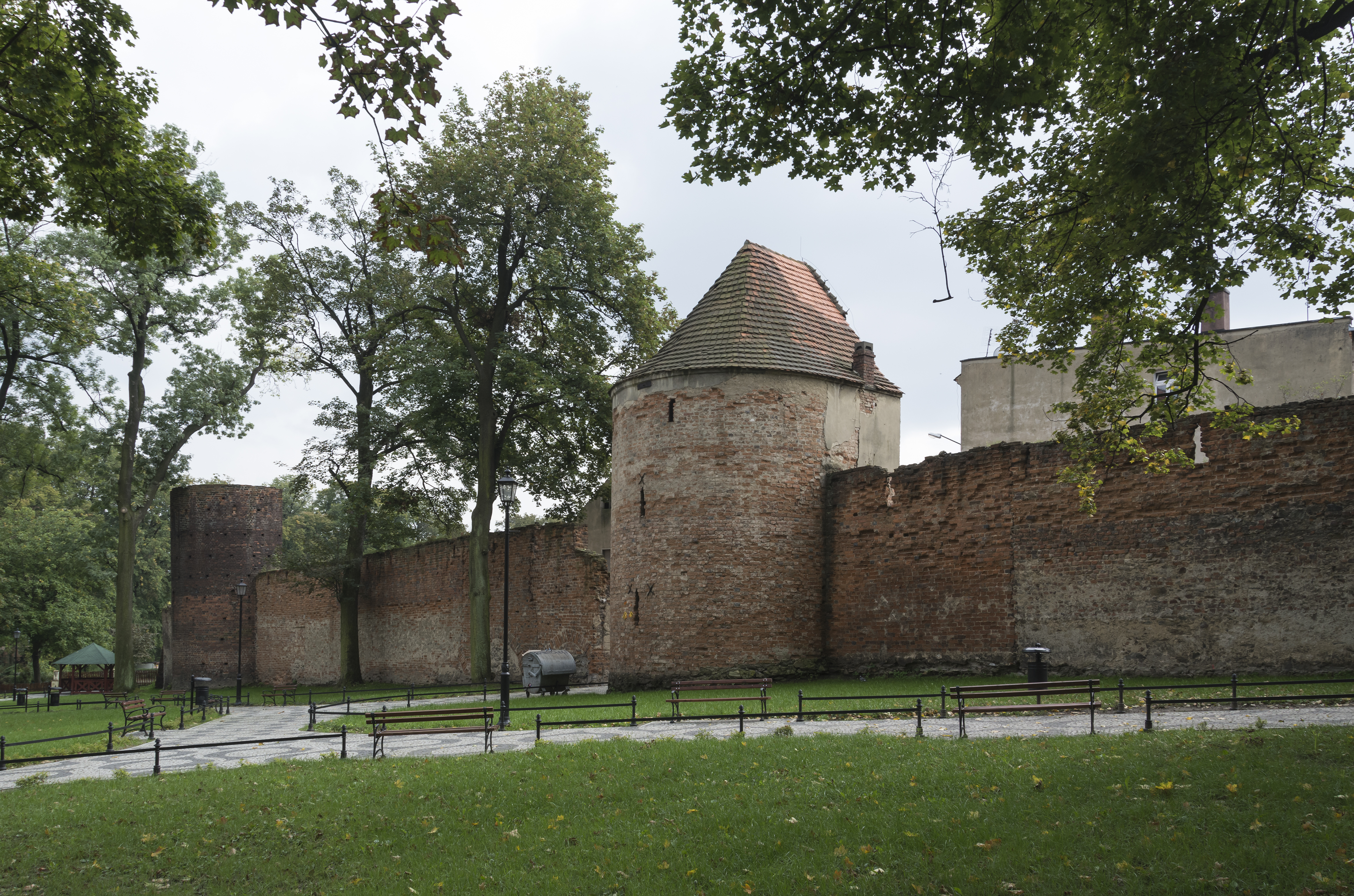 Ząbkowice Śląskie, mury obronne, pocz. XIV, kon. XVI